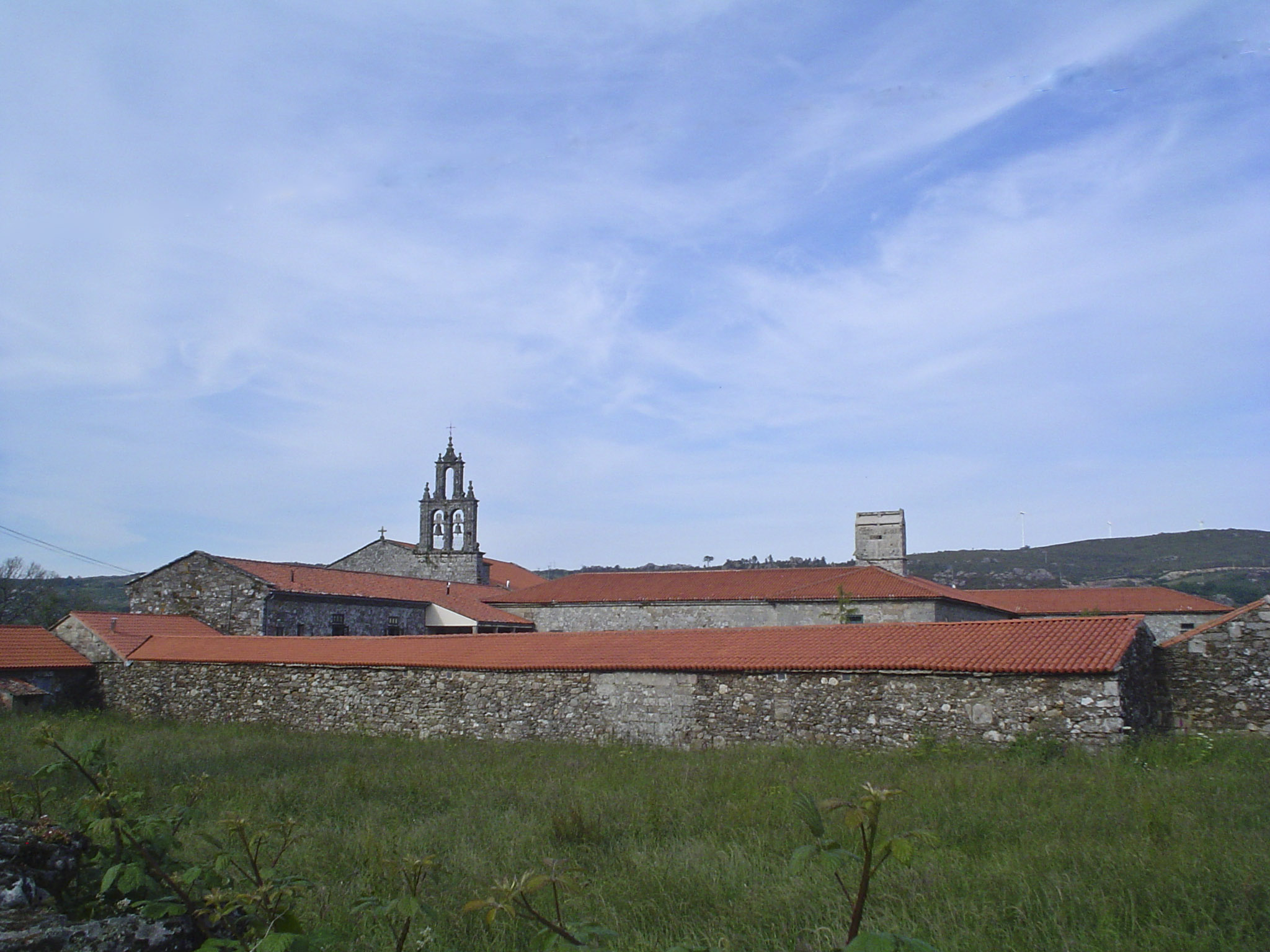 Vista xeral do Mosteiro de Aciveiro